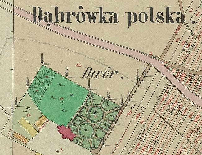 Mapa dworu w Dąbrówce Polskiej koło Sanoka.